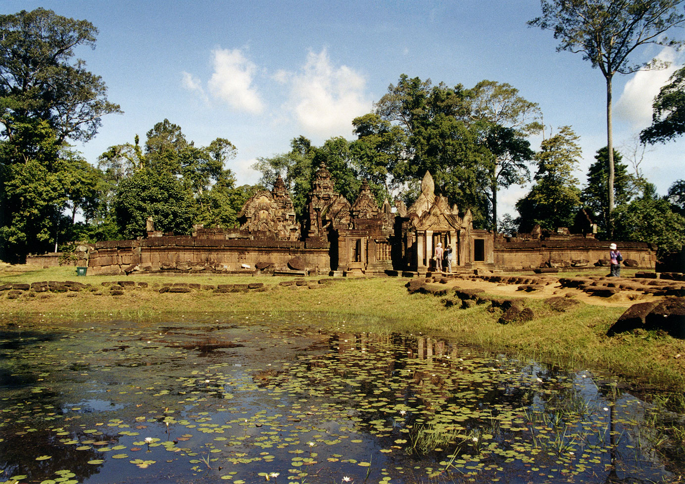 Banteay Srei in Angkor, Cambodia